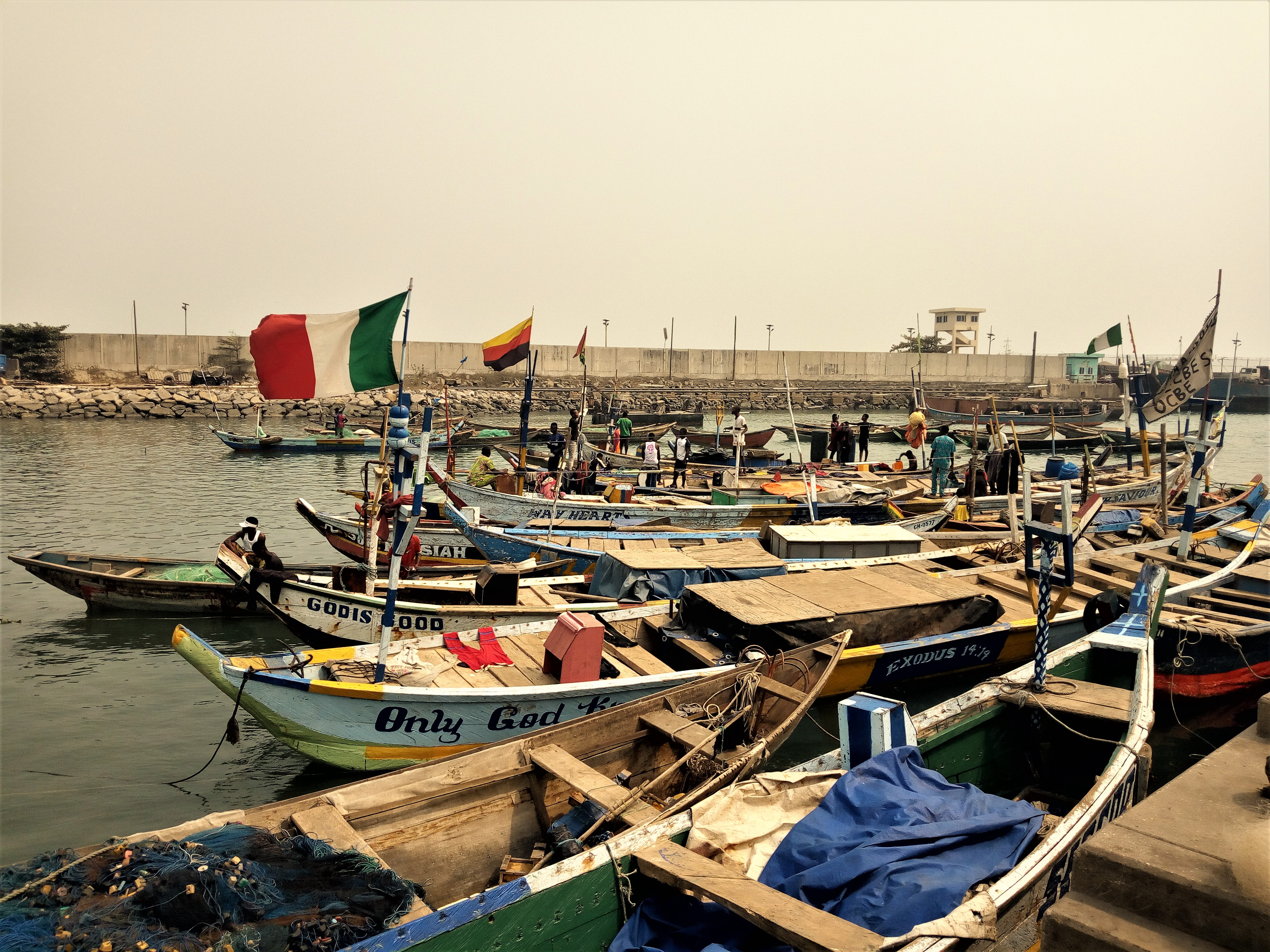 Des barques au port de pêche de Cotonou au Bénin This is an image with the theme "Africa on the Move or Transport" from: Benin